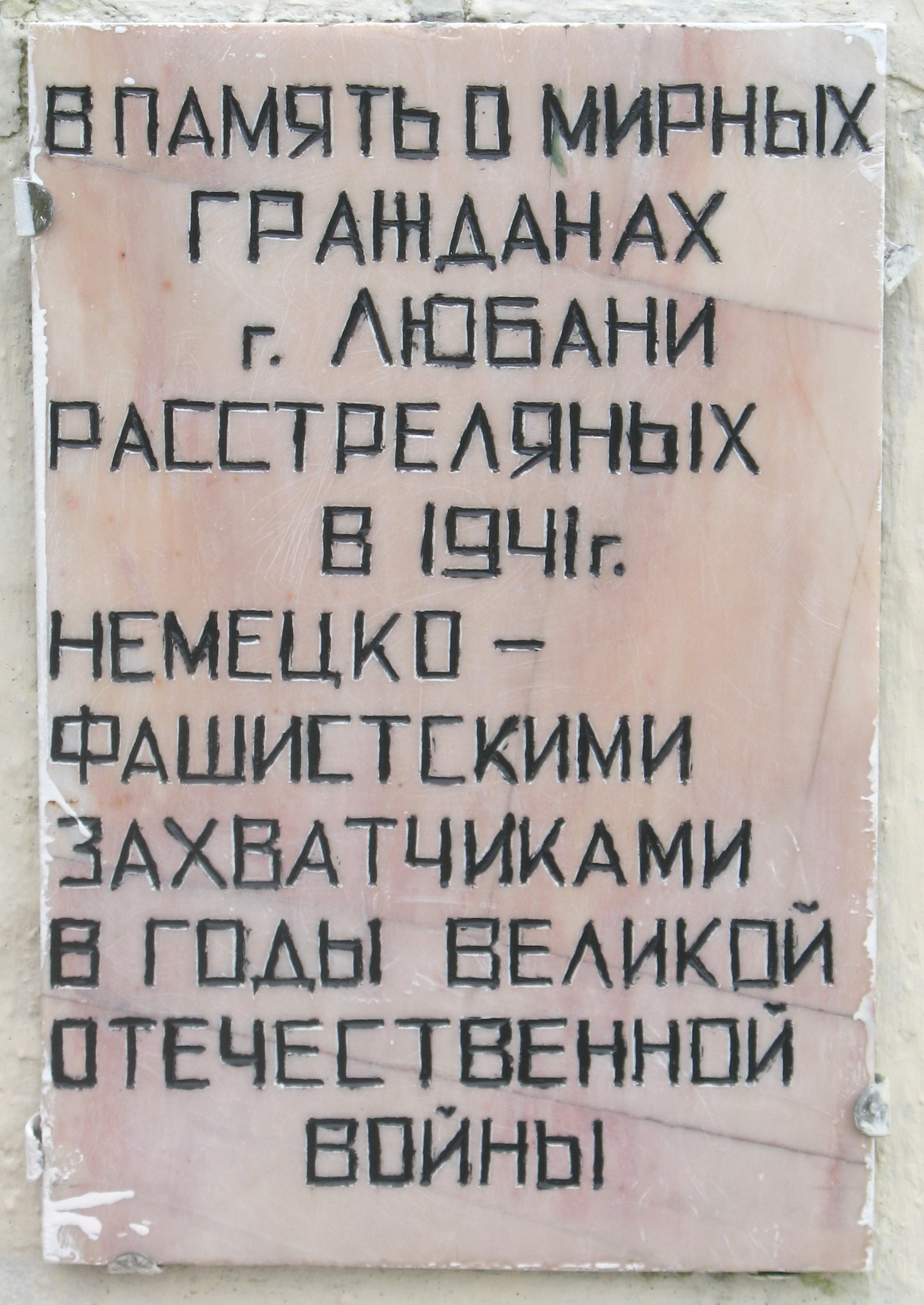 Табличка на памятнике евреям в городе Любань (Любанский район Минской области), убитым нацистами в ноябре 1941 года.